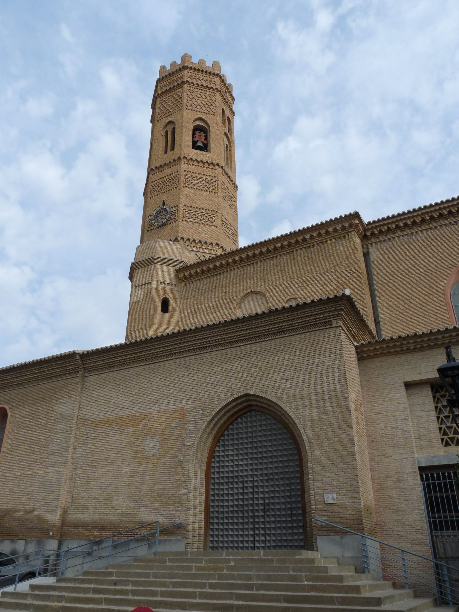 Tauste - Iglesia de Santa María (gótico s. XIII) - Torre mudéjar (mudéjar ca. 1300)